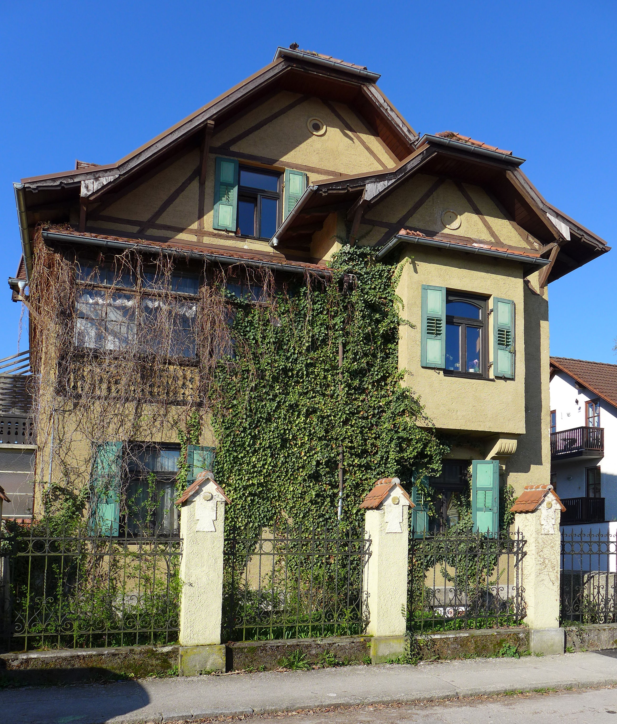 Dachstr. 7, München